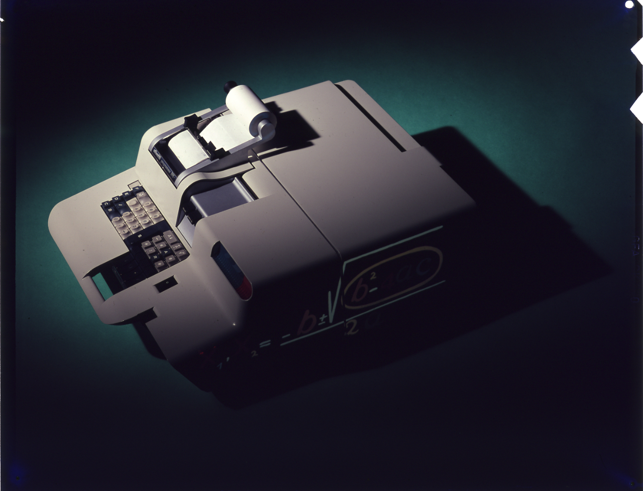 Servizio fotografico : Italia, 1968 / Paolo Monti. - Buste: 8, Fototipi: 8 : Diapositiva, sviluppo cromogeno/ pellicola ; 10x12. - ((Serie costituita da 8 buste sciolte di diapositive identificate con i nn.: 1162, 1163, 1164, 1165, 1166, 1167, 1168, 1169. - Sulla busta identificata con il n. 1162 iscrizione didascalica manoscritta a penna. - Alla fine del 1964 nasce "Programma 101", il calcolatore elettronico da tavolo chiamato anche Perottina o P101. - Fonte: Rubrica di Paolo Monti: Archivio 10x12 (ultimi numerati) - dal G1 al (s.d.), presso Archivio Paolo Monti